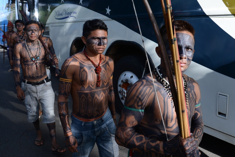 Brasília - Cerca de 140 indígenas mundurukus se reúnem com o ministro da Secretaria-Geral da Presidência, Gilberto Carvalho, e representantes de outros órgãos do governo para discutir a suspensão de empreendimentos energéticos na Amazônia e outras reivindicações indígenas